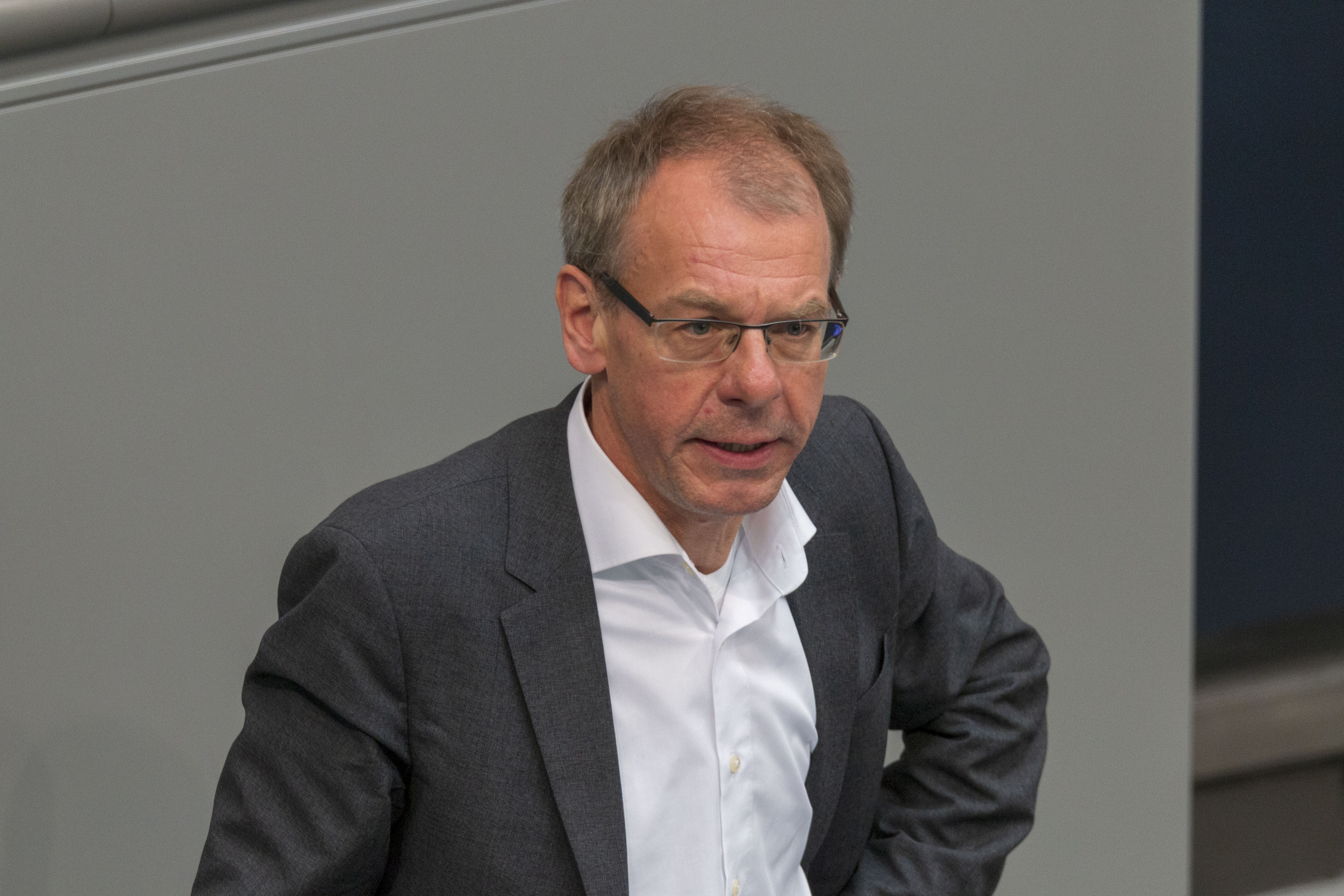 Markus Kurth, Bundestagsabgeordneter der GRÜNEN während der Plenarsitzung des Deutschen Bundestages am 2. Juli 2020 in Berlin.